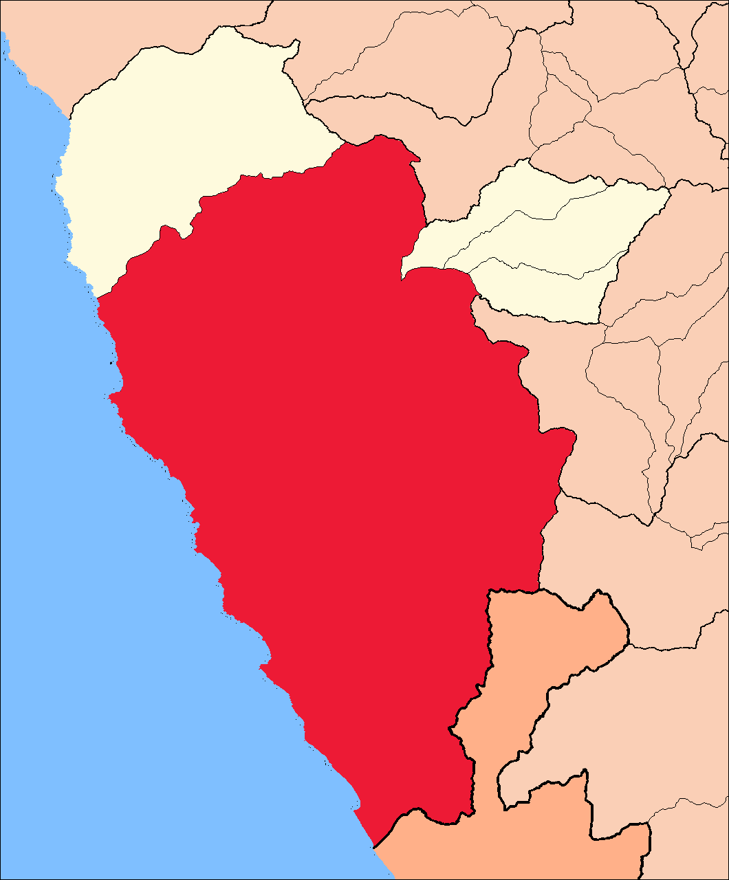 Ubicación del área del distrito de Huarmey.